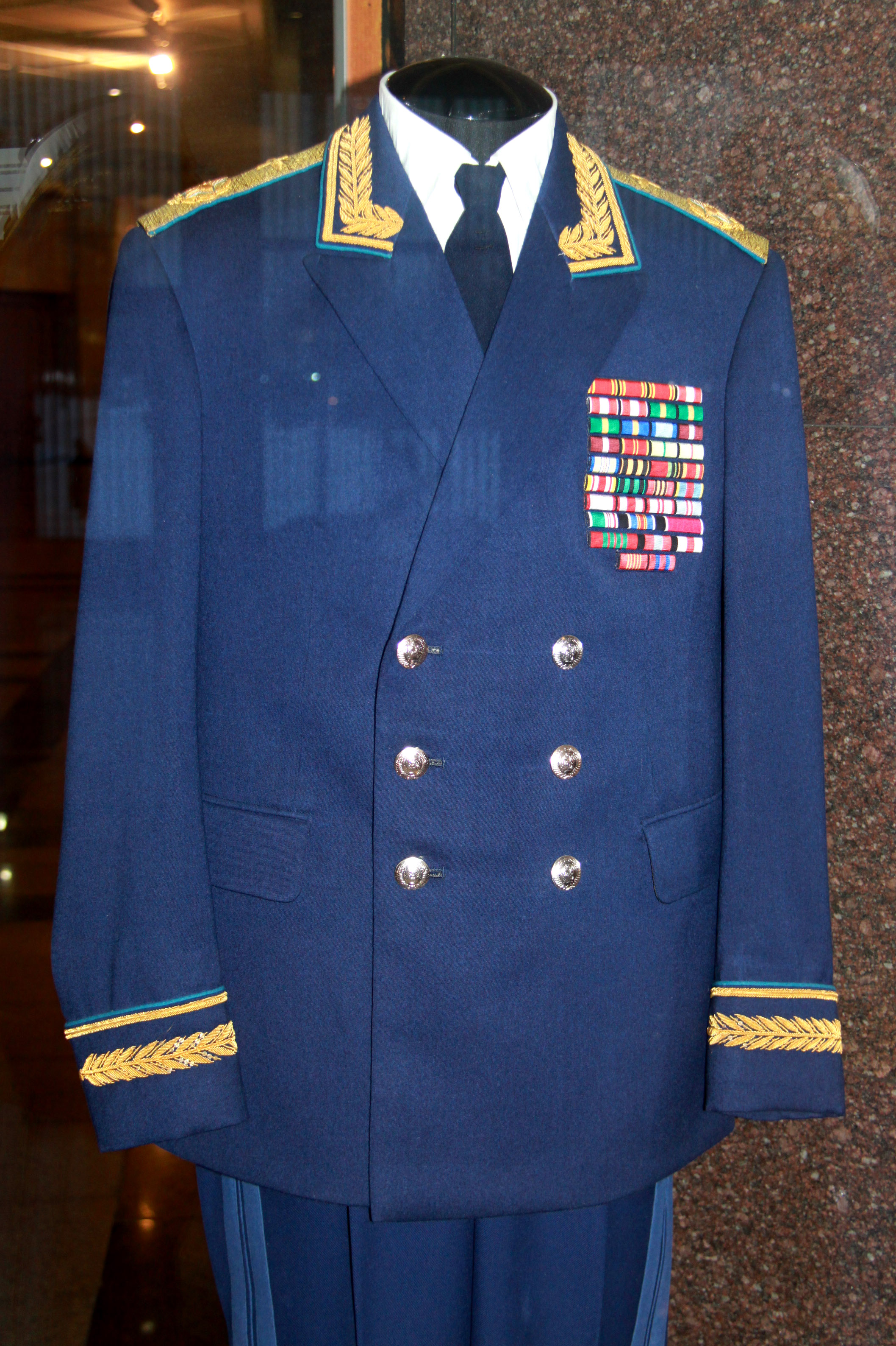 Парадно-выходная форма образца 1955 года Главного Маршала авиации Александра Александровича Новикова